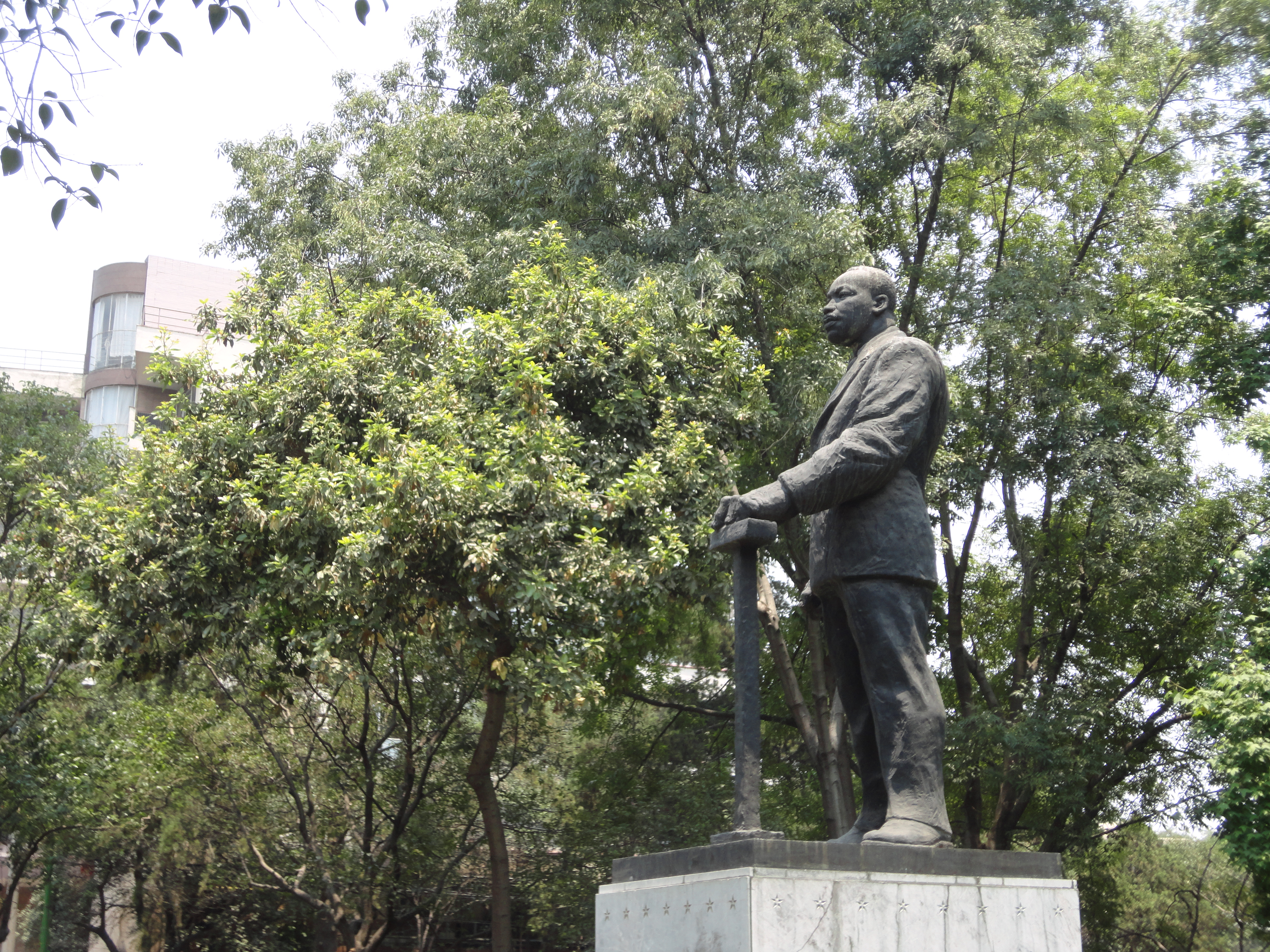 Estatua del Dr. Martin Luther King en el parque abraham linconl en el área de polanco en el distrito federal en México